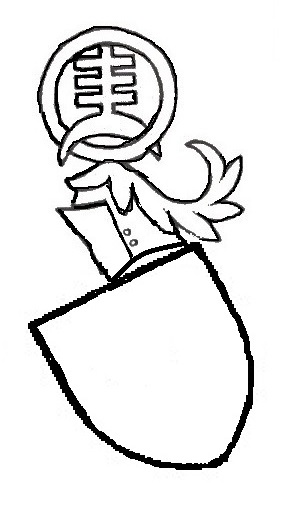 Pokus o rekonstrukci erbu Mikuláše z Husi (figura ve štítu neznámá, klenot dle kresby Zdirada J. K. Čecha).